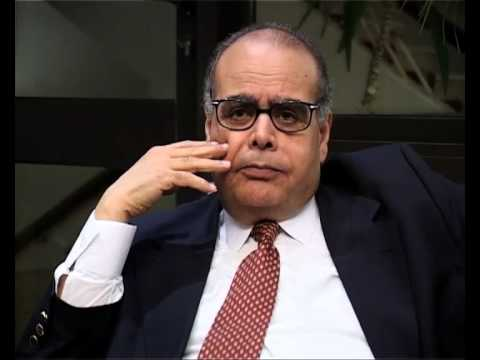 Nasr Hamed Abu Zeid sur un plateau de télévision